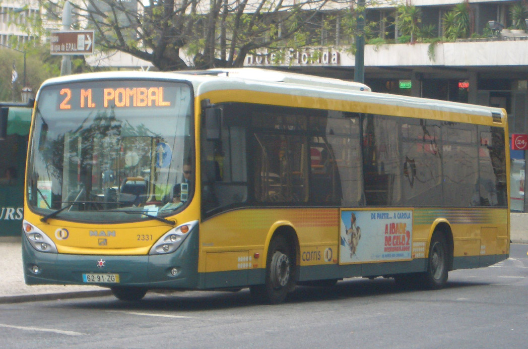 Un autobús de Carris en la Praça Marquês de Pombal (Lisboa). Autoría propia.